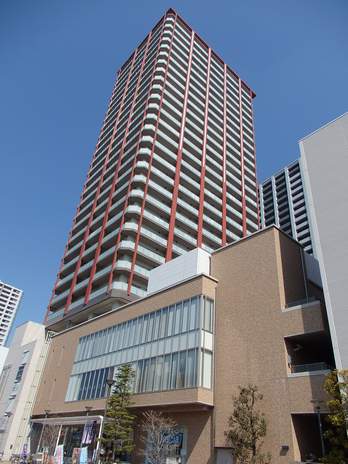 プラウドタワー武蔵浦和テラス